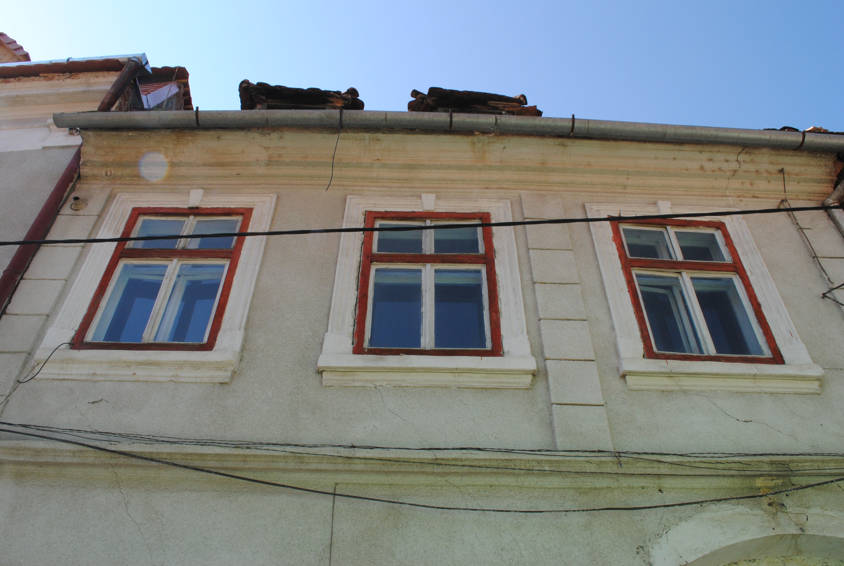 Casă, sec. XV (fragmente), sec. XVIII, 1825 - 1850